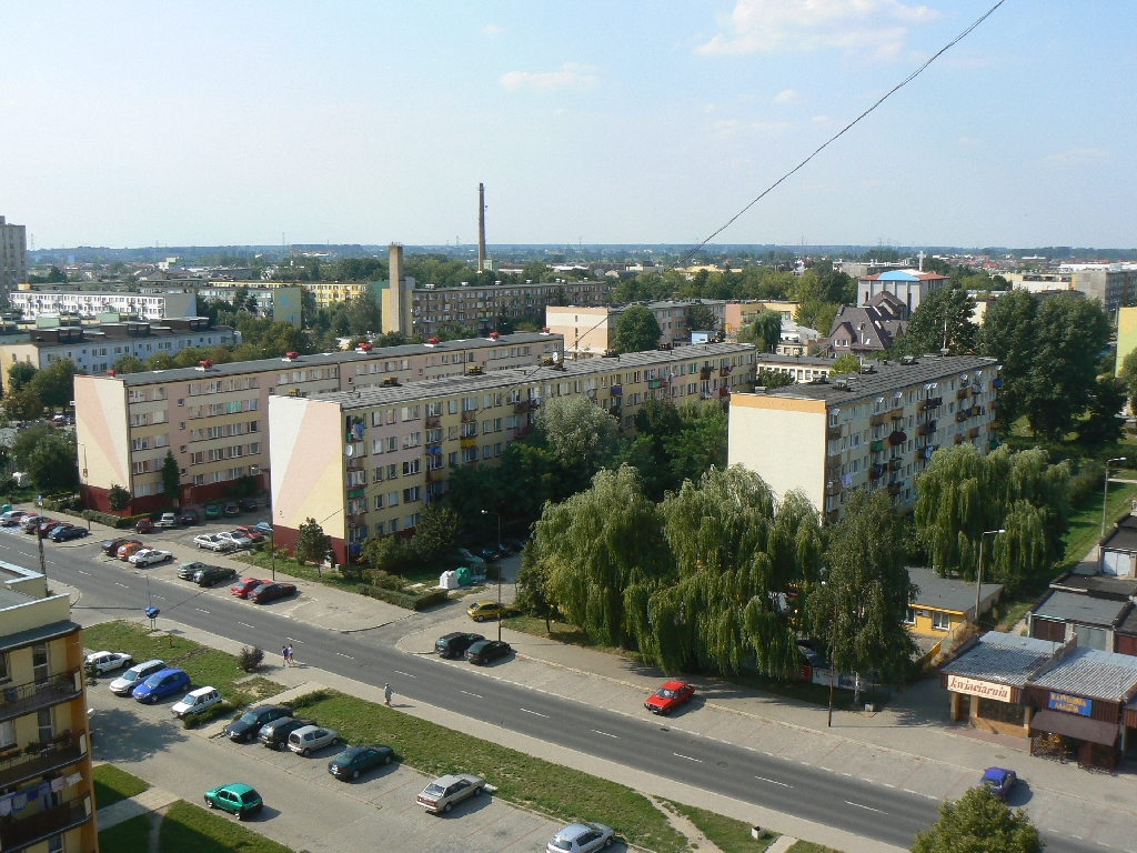 osiedle 1 Maja, bloki 1,2,3(Bełchatów)